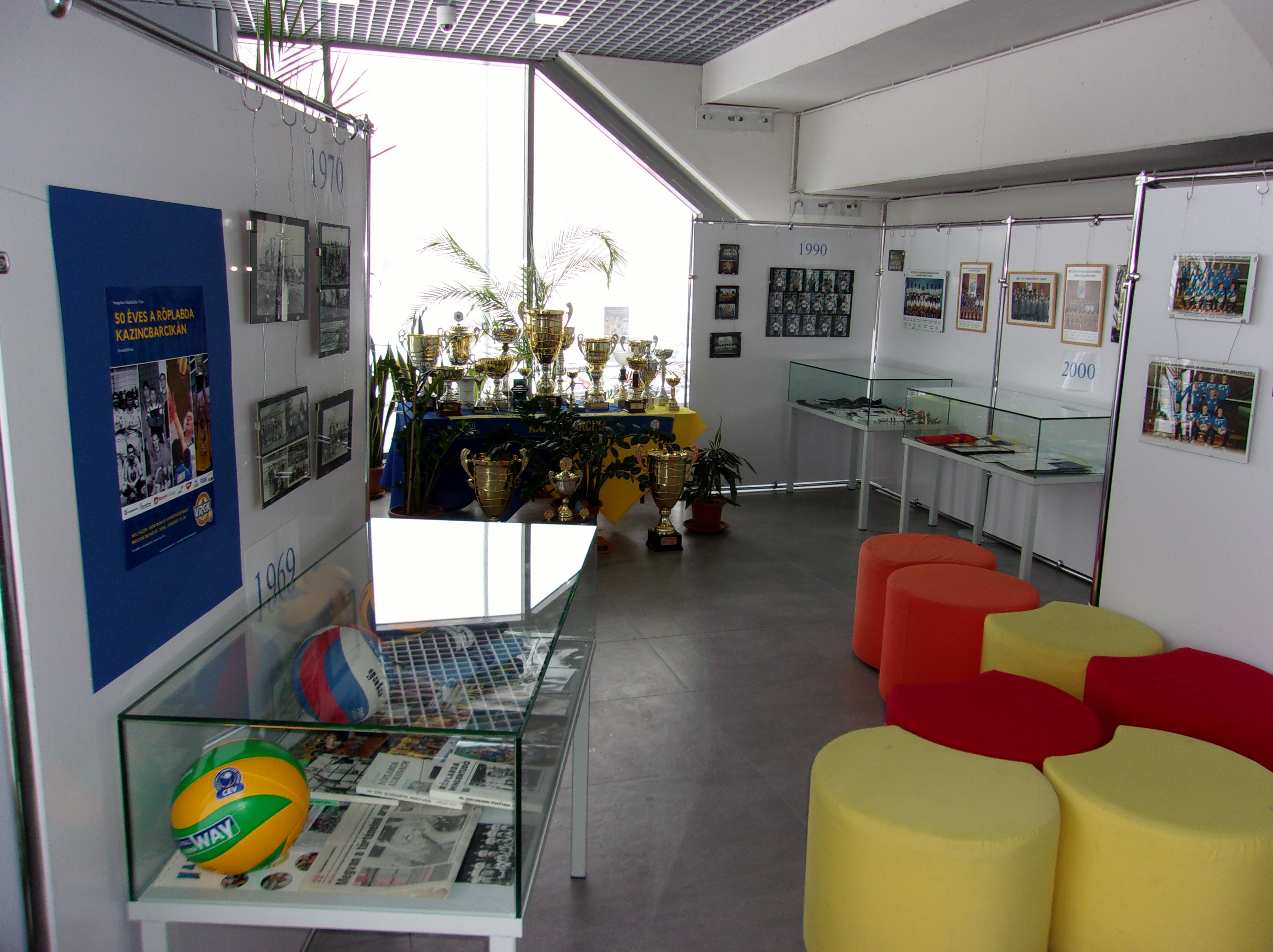 50 éves a Vegyész Röplabda Club Kazincbarcika - emlékkiállítás